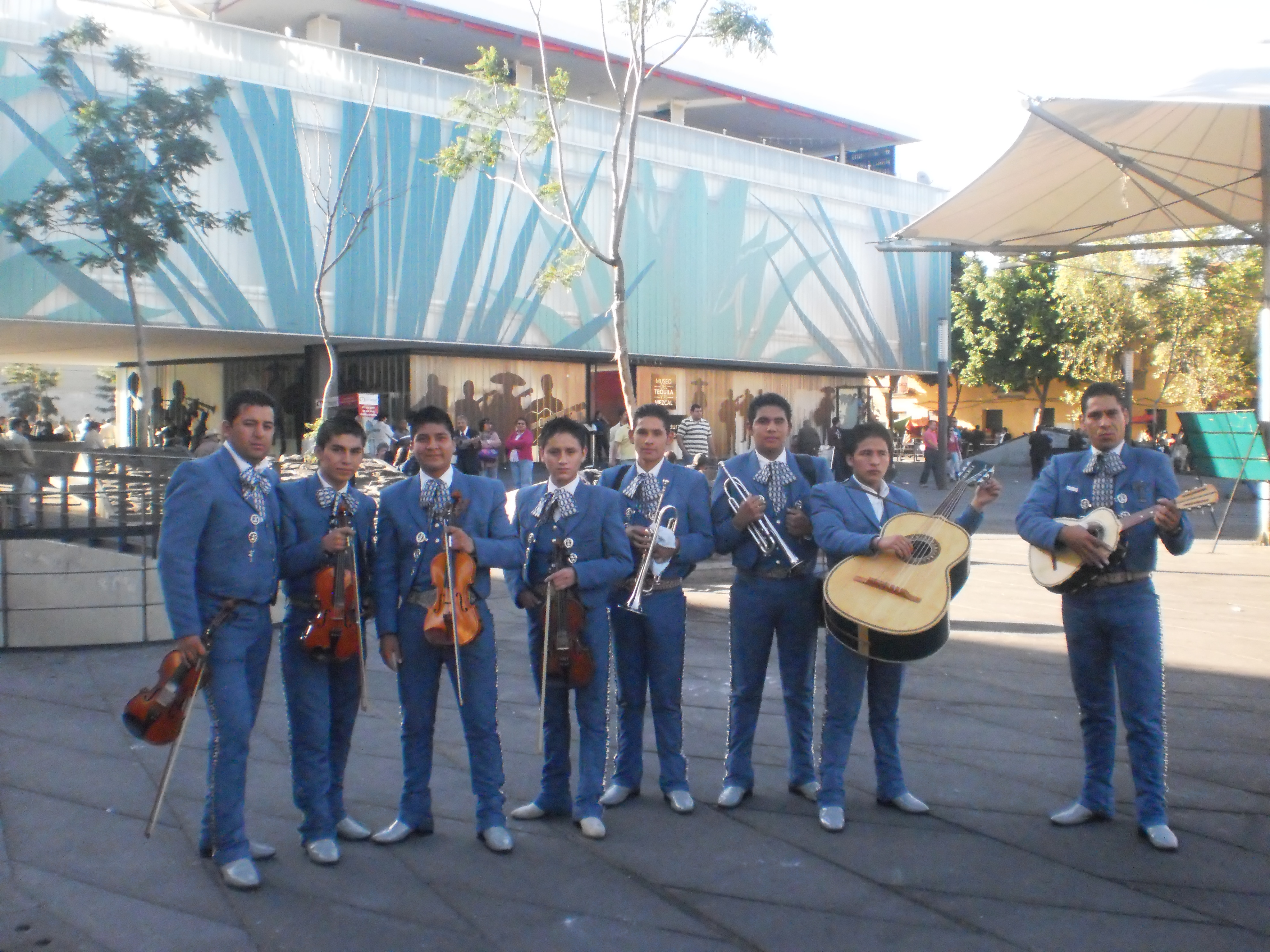 Lo representativo de la plaza